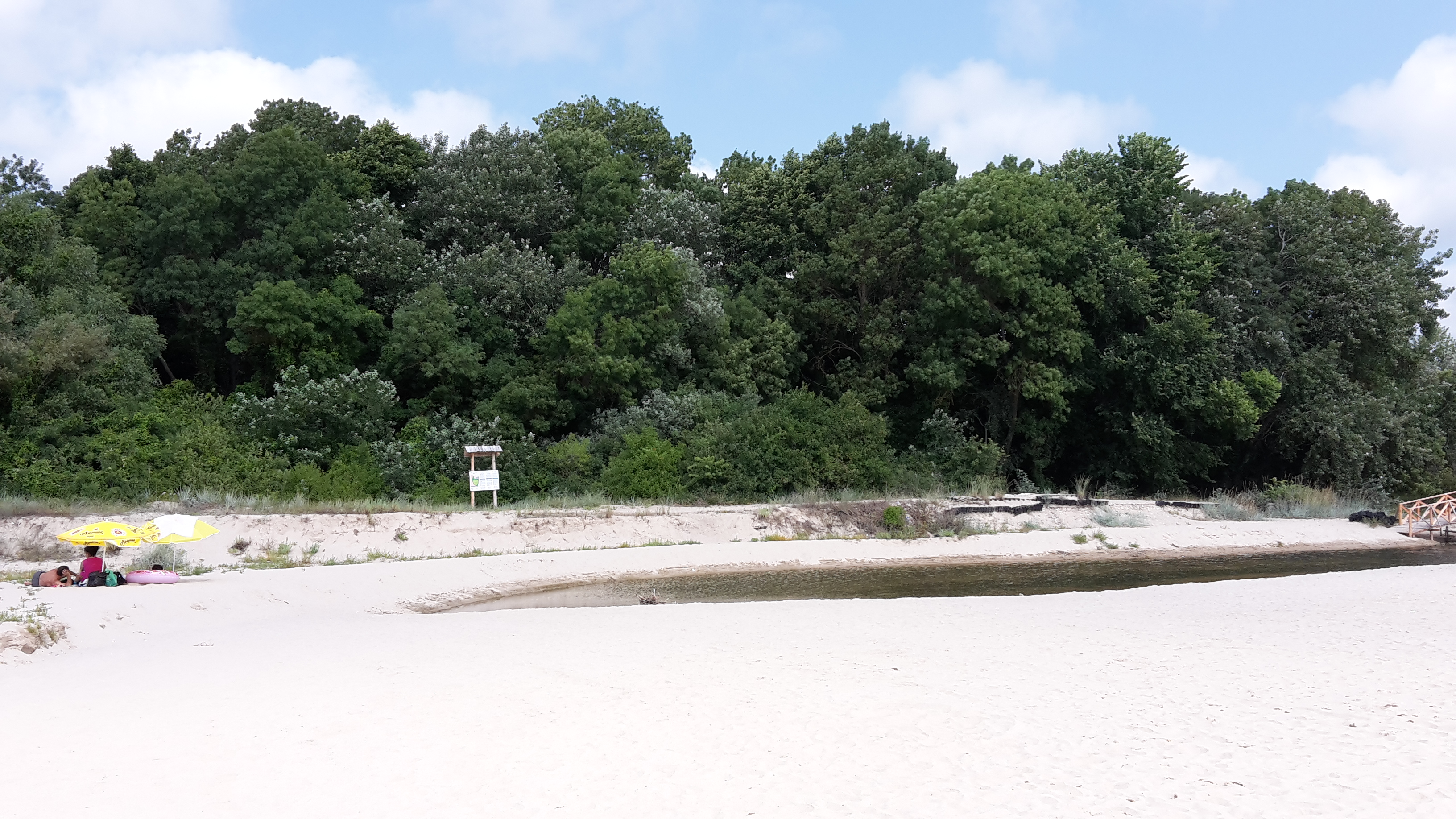 Naturschutzgebiet Baltata, Albena, Bulgarien.